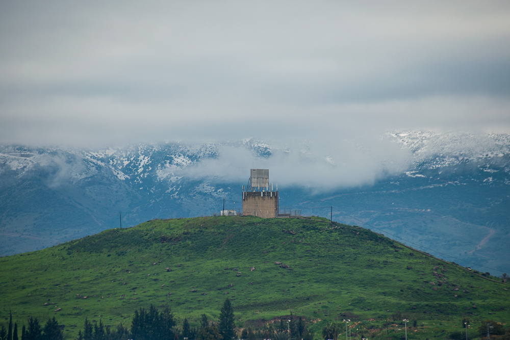 תל ברום בצפונה של קרית שמונה וברקע החרמון המושלג